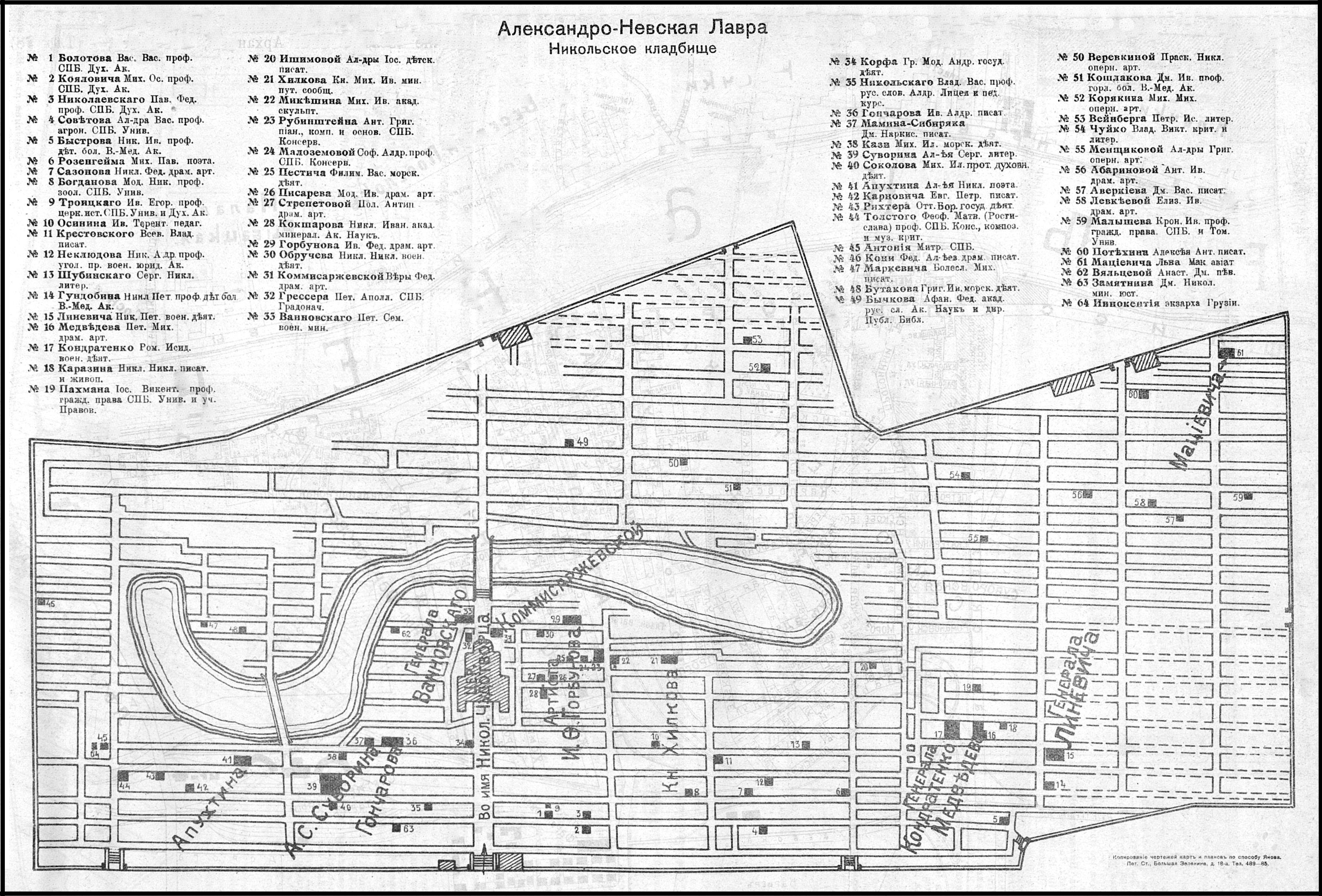 План Никольского кладбища Александро-Невской лавры, 1914 год